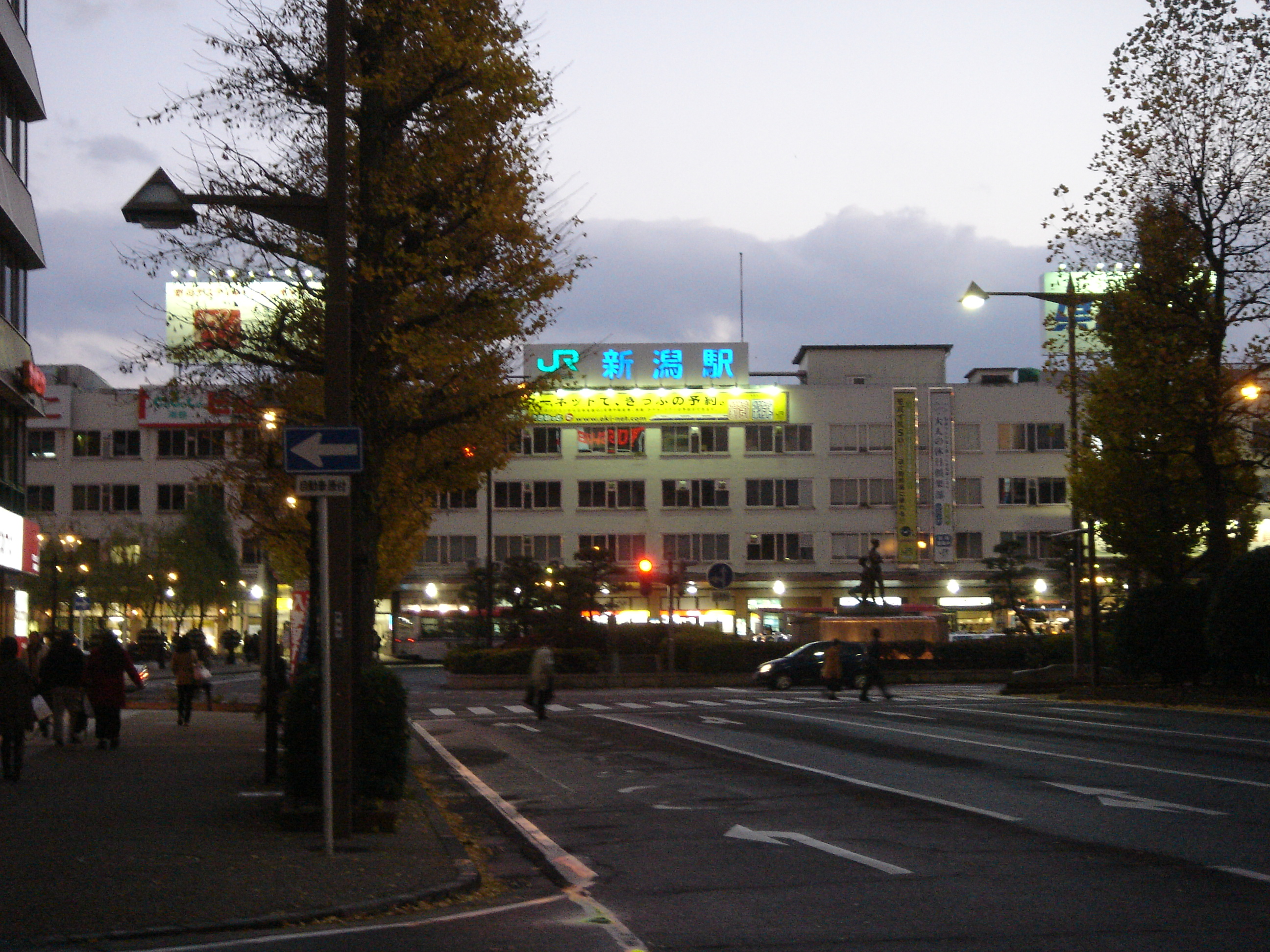 万代口